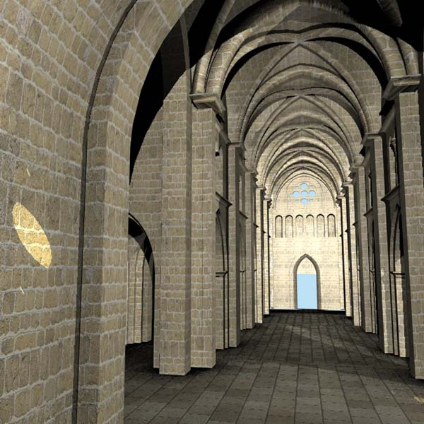 Reconstitution en 3D de l'abbatiale.